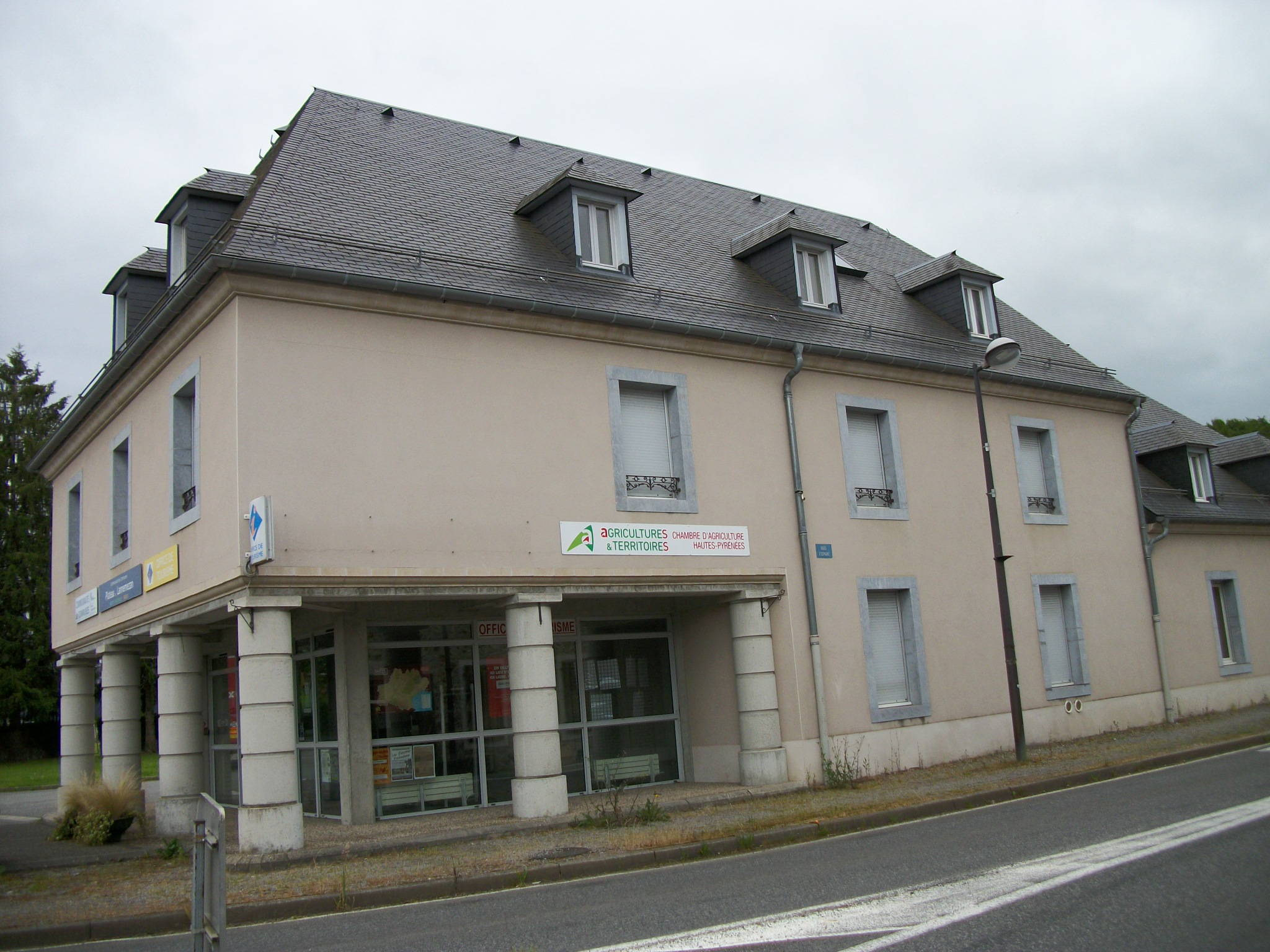 La Barthe-de-Neste